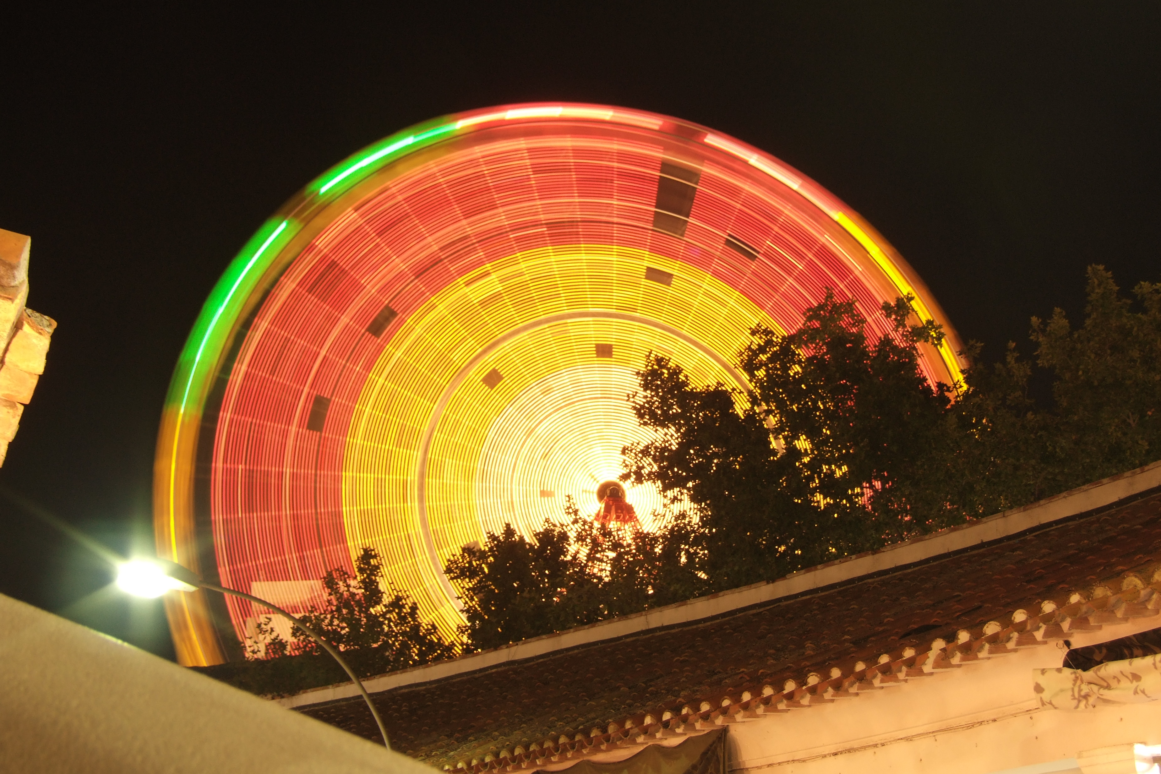 Noria de la Feria de Albacete